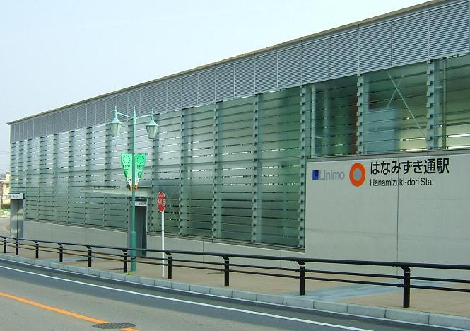 愛知県愛知郡長久手町久保山に所在する東部丘陵線（リニモ）のはなみずき通駅。